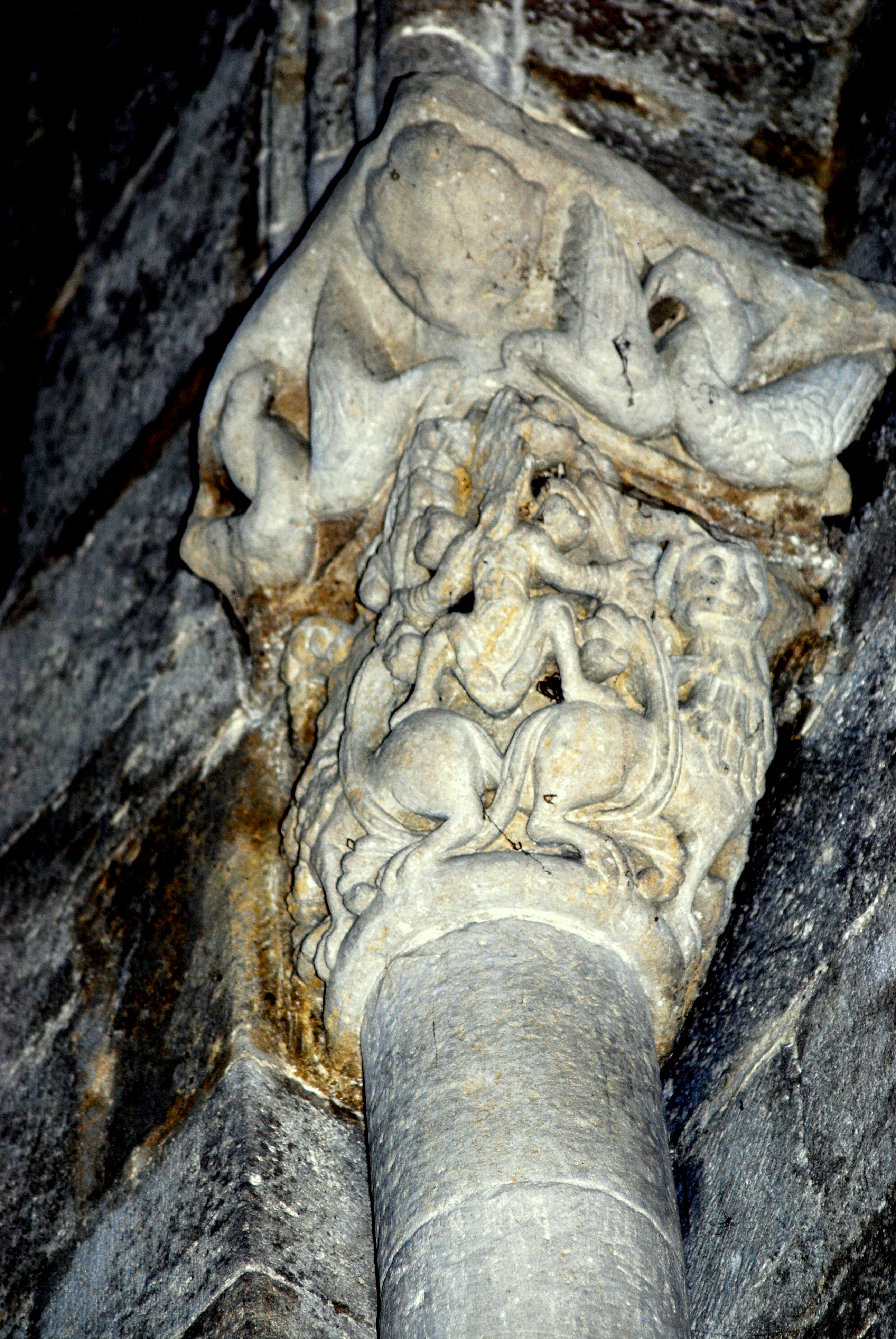 Chapiteaux de l'abbaye de Saint-Ferme